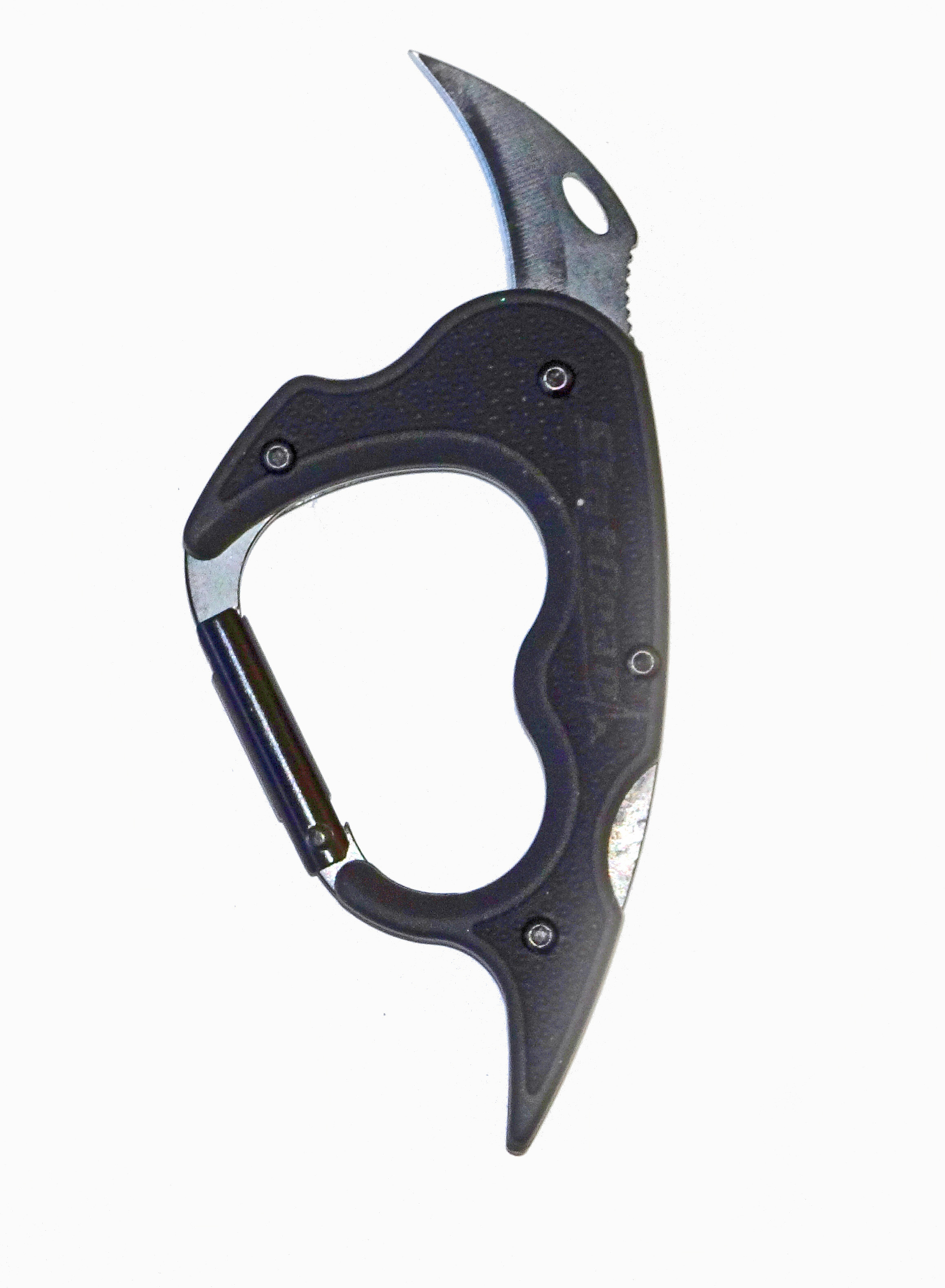 CaraClaw Carabinermessser, geöffnet. Gewicht: 69 g, 9,5 x 5,3 cm bei geschlossener Klinge.12,3 x 5,3 cm bei offener Klinge. Klinge sperrt und verfügt über eine Entriegelungstaste an der Seite des Clips. Gummibeschichtet, aufgrund geringer Belastbarkeit nicht zum Klettern geeignet.